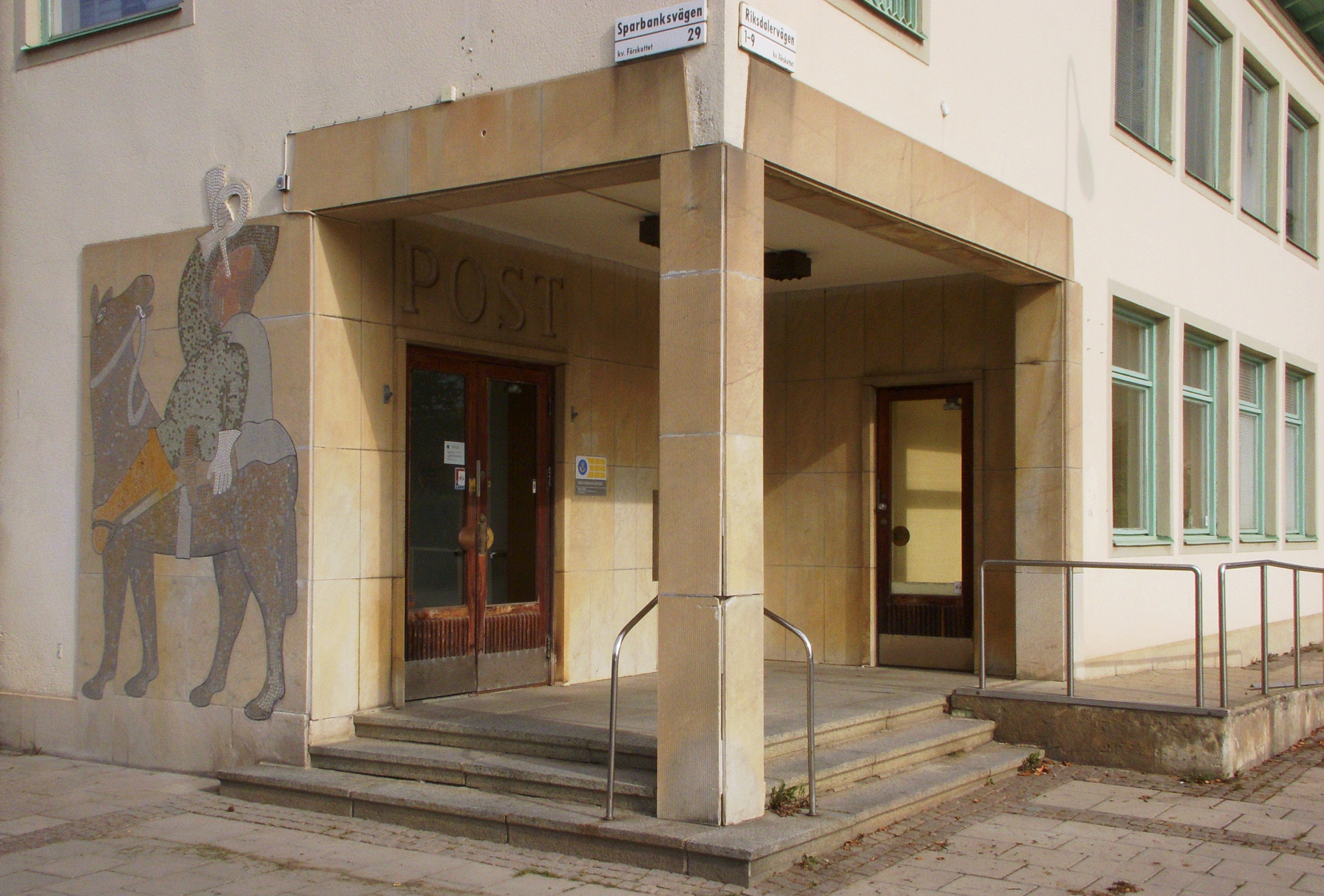 Kvarteret Förskottet, Hägerstensåsen (Posthuset) arkitekt Lars-Erik Lallerstedt